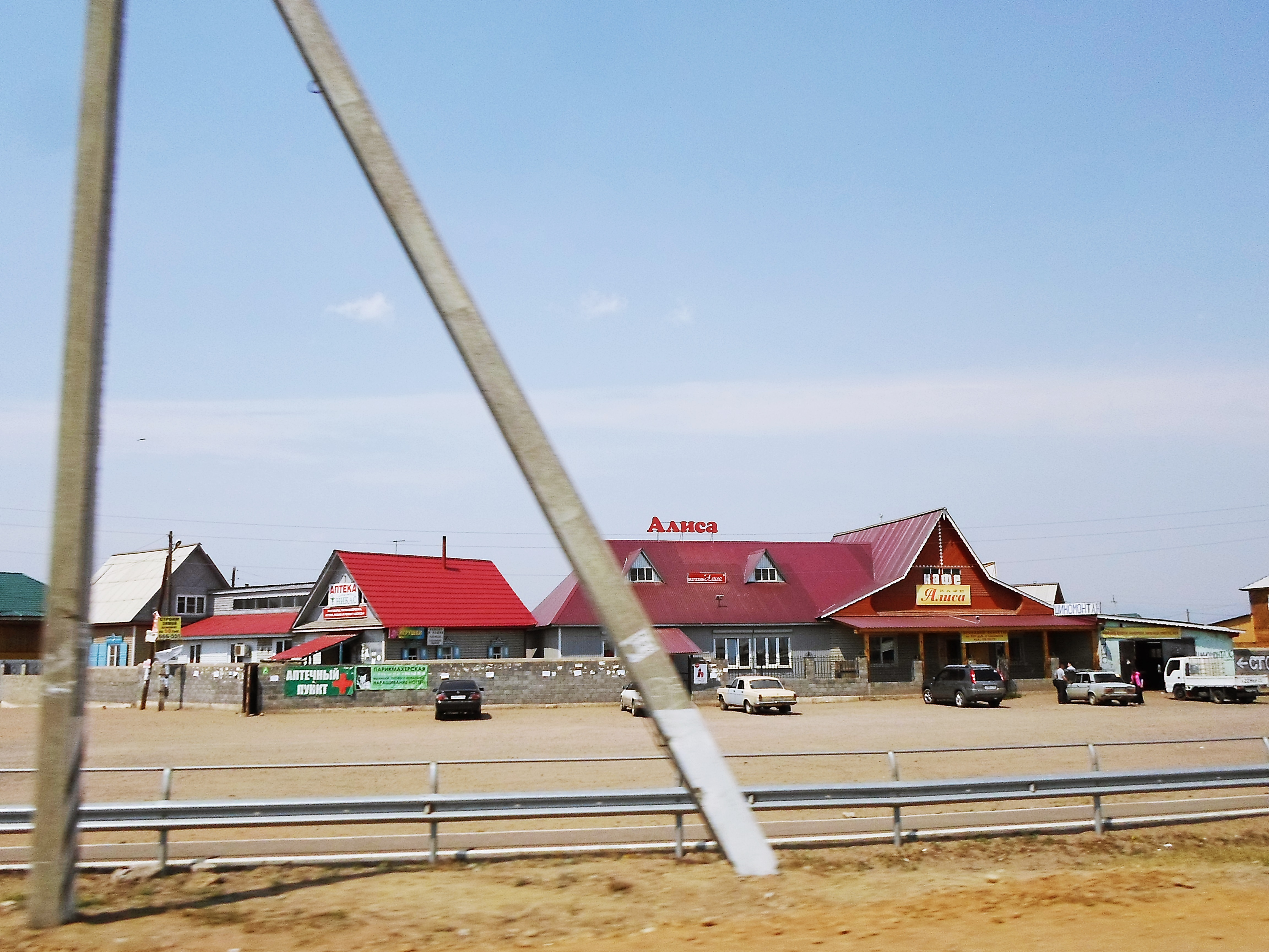 Торговый комплекс "Алиса" в Нур-Селении. Продовольственный и промтоварный магазины, кафе, парикмахерская, шиномонтаж и др.